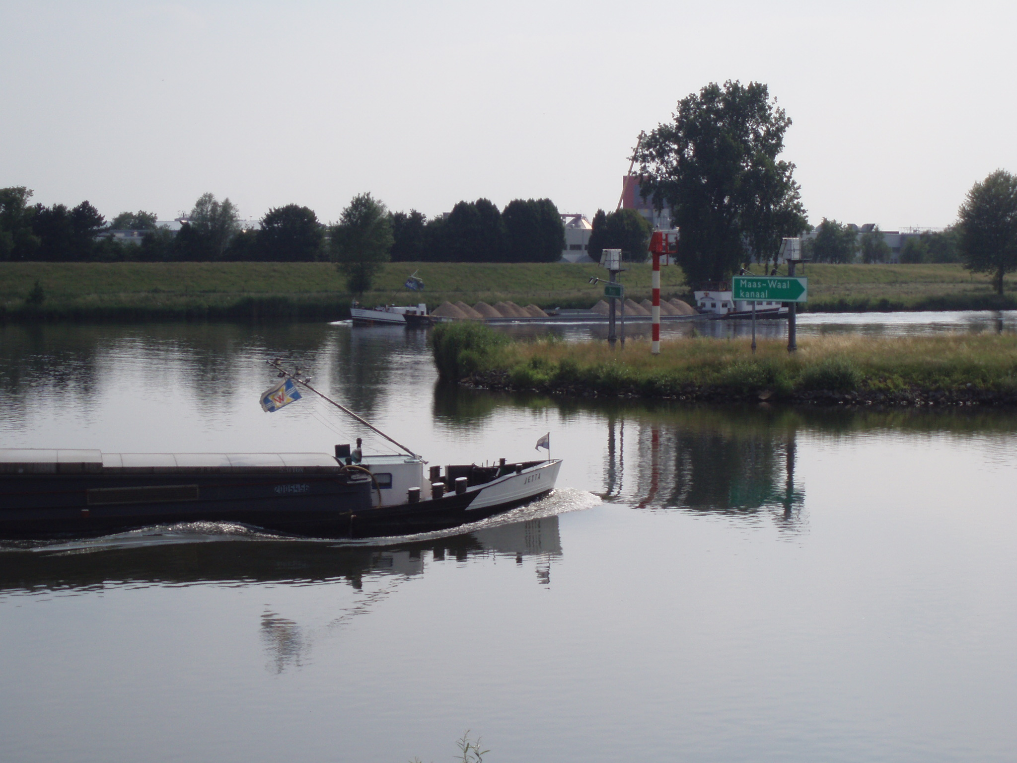 eigen foto (c) 2006 looi